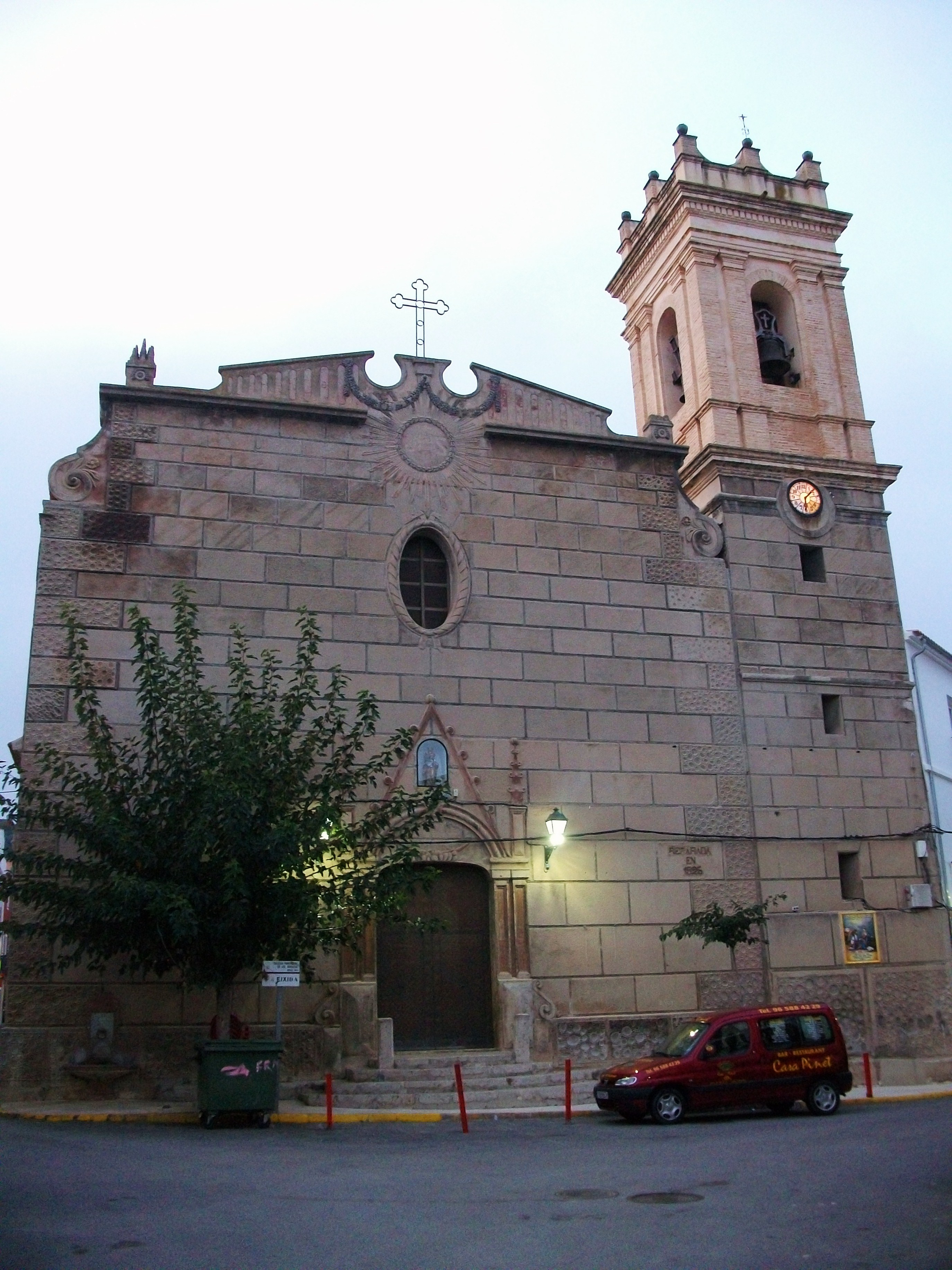 Església de Santa Bàrbara de Tàrbena.